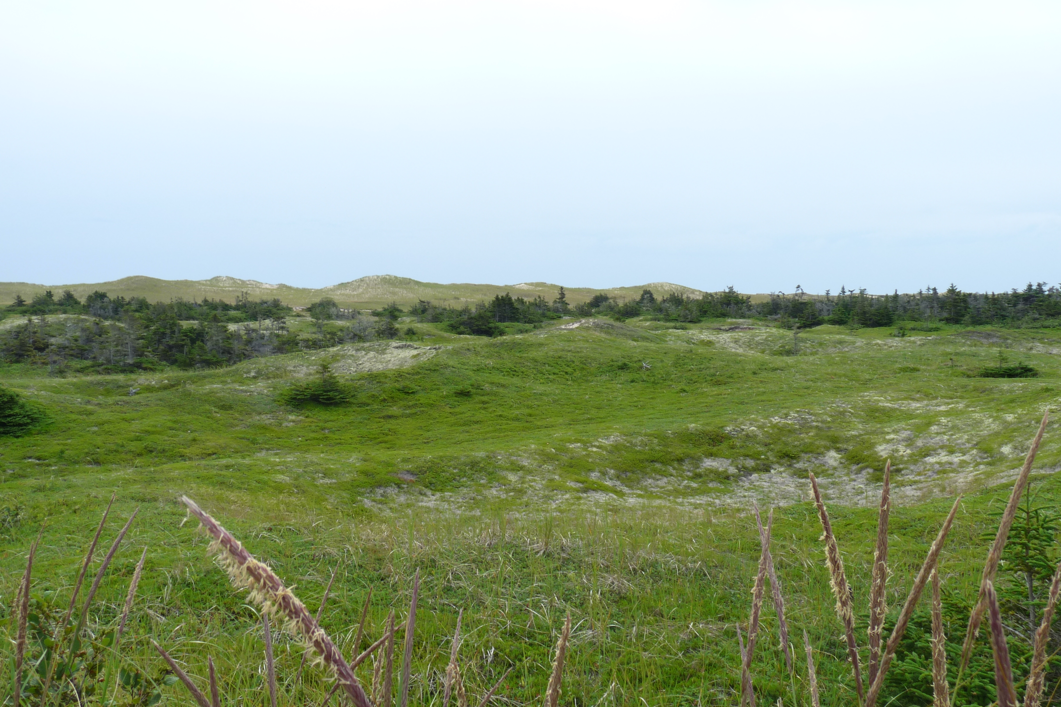 Les zones de dunes et collines représentant la flore dans la RNF de la Pointe de l'Est